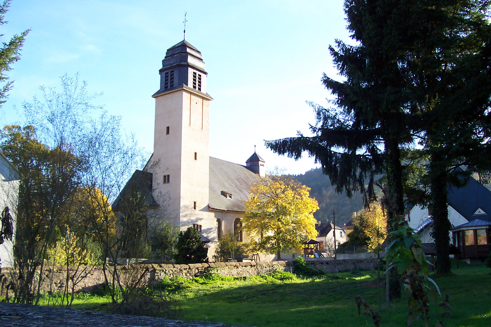 Kirche Wasserliesch